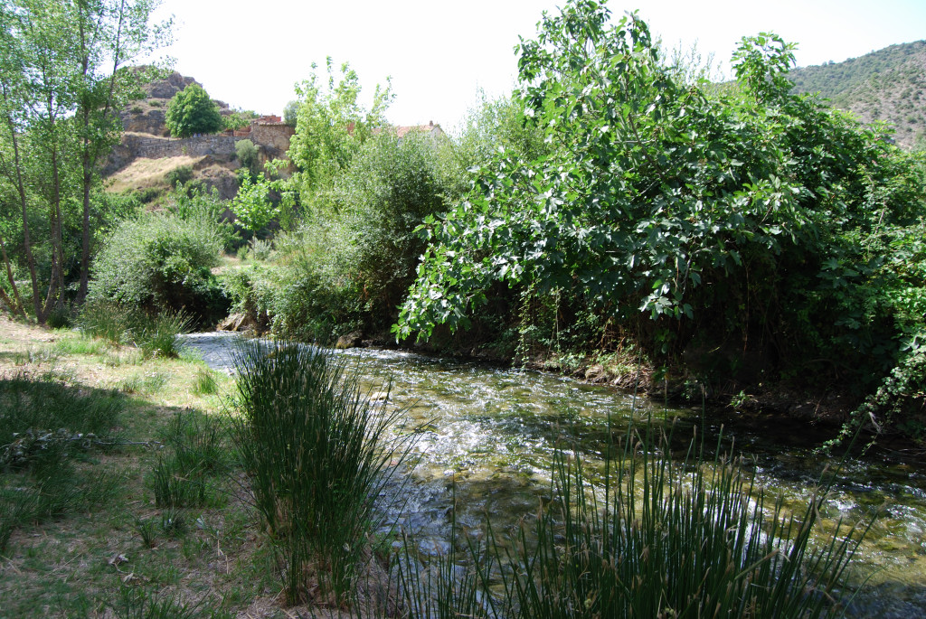 El río Ebrón a su paso por la localidad de El Cuervo (Teruel)